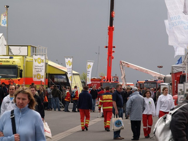 Rettmobil 2007, Fulda, Germany